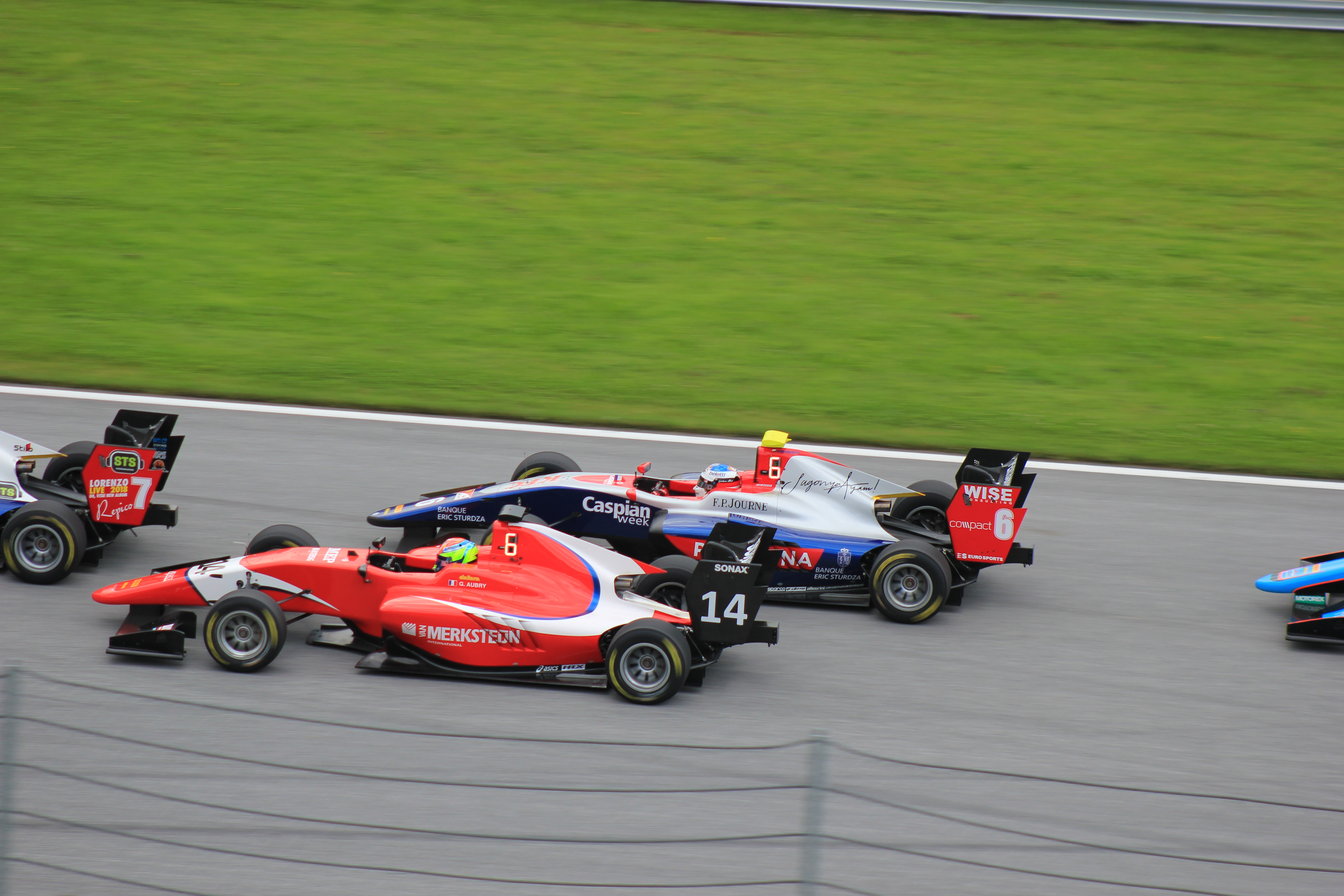 Kampf um Positionen auf der ersten Gerade beim erstes Rennen in Österreich 2018. Auf dem Bild zu sehen das Heck von Tveter und Aubry beim Überholen von Alesi